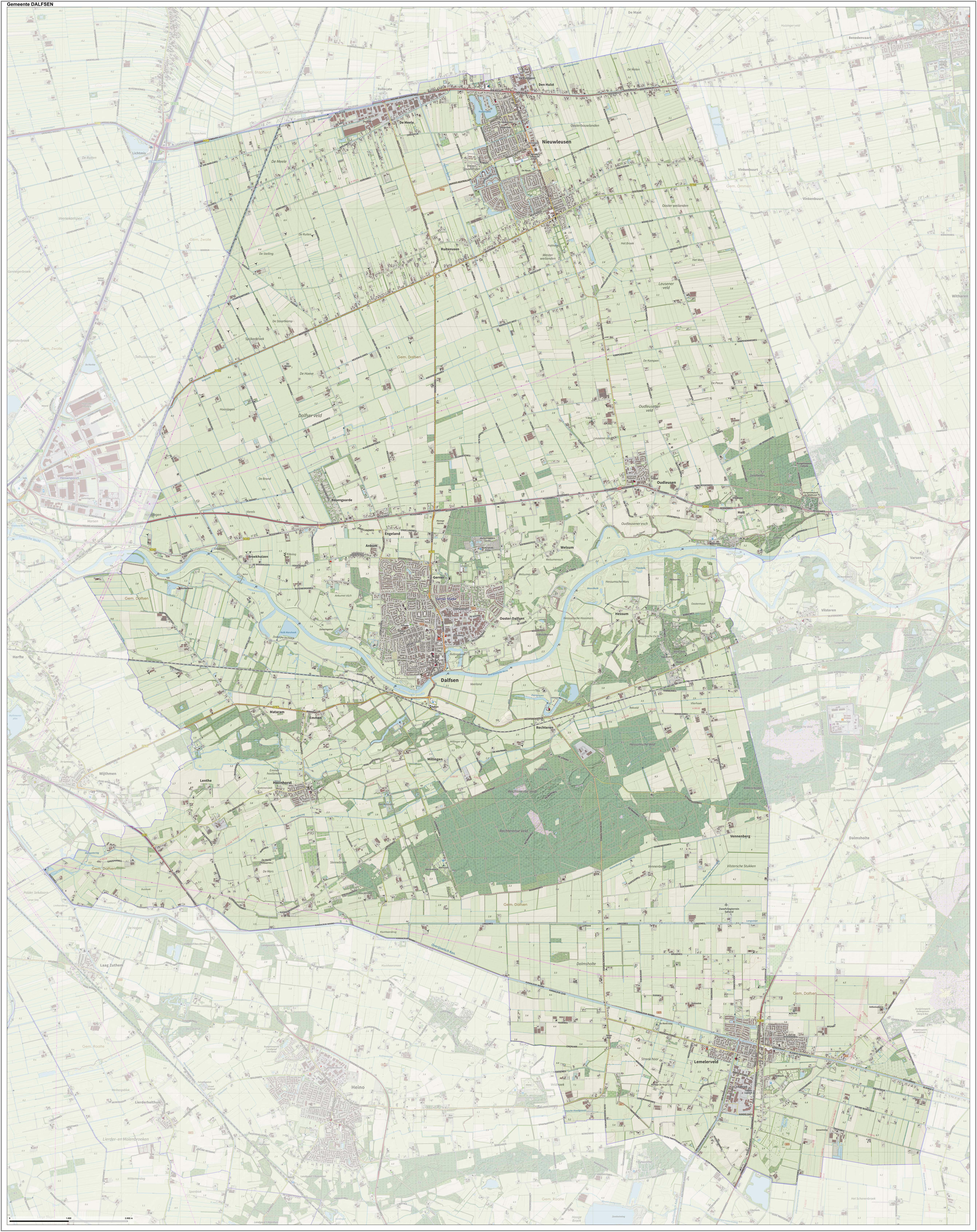 Topografische gemeentekaart. Resolutie: 400 pixels/km. Kaartbeeld samengesteld uit de open geodata van de Top10NL en Top25namen (Kadaster), Creative Commons-BY licentie. Gebouwvlakken uit open geodata BAG extract. Wegen uit de OpenStreetMap, OpenStreetMap community. Reliëfschaduw uit de Actuele Hoogtekaart AHN2. Samenstelling en kleurenschema: Jan-Willem van Aalst, met QGIS. Zie ook de Legenda.